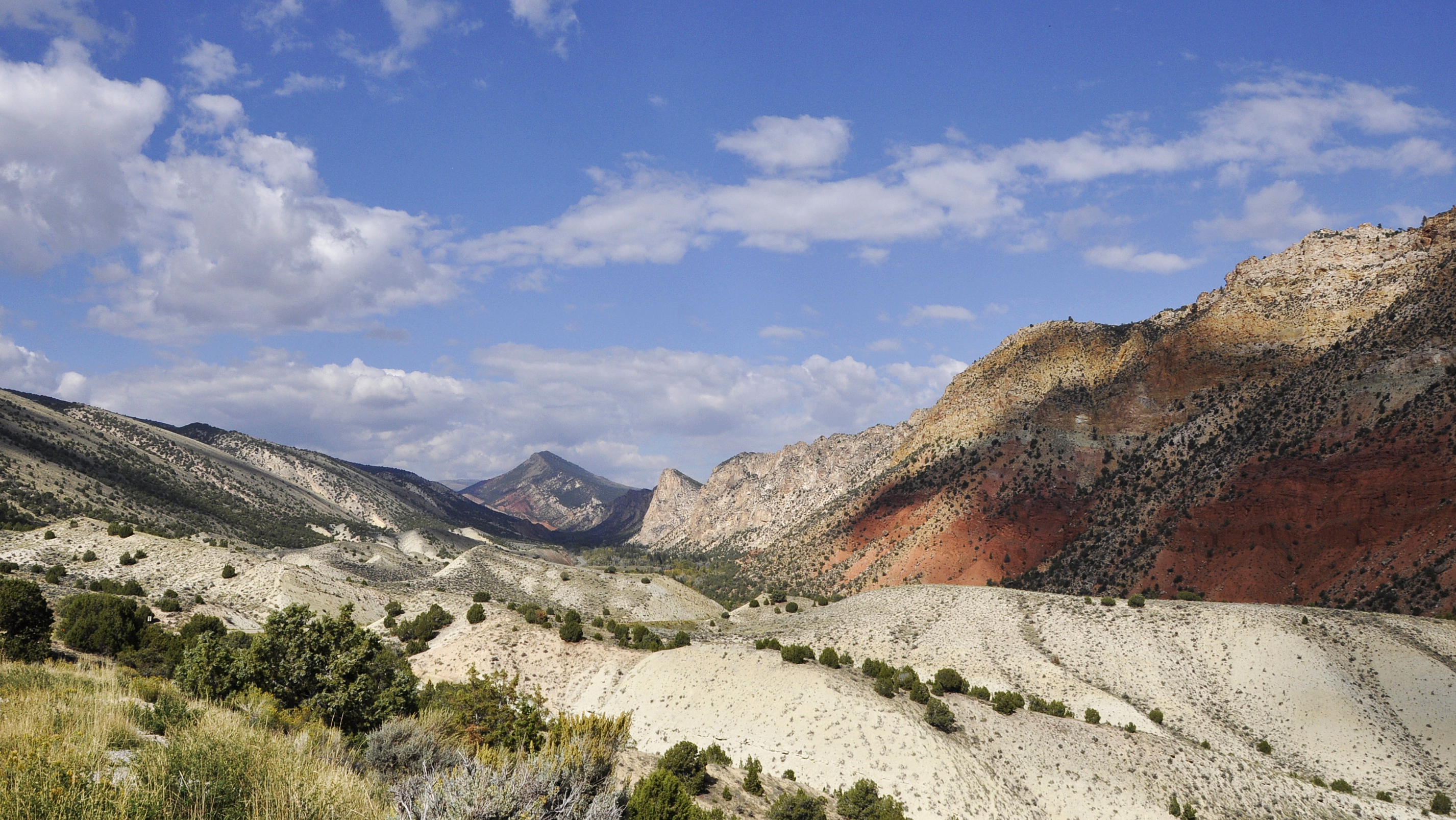 Flaming Gorge National Recreation Area, Utah, USA - vanaf de Sheep Creek Overlook met Jessen Butte op de achtergrond